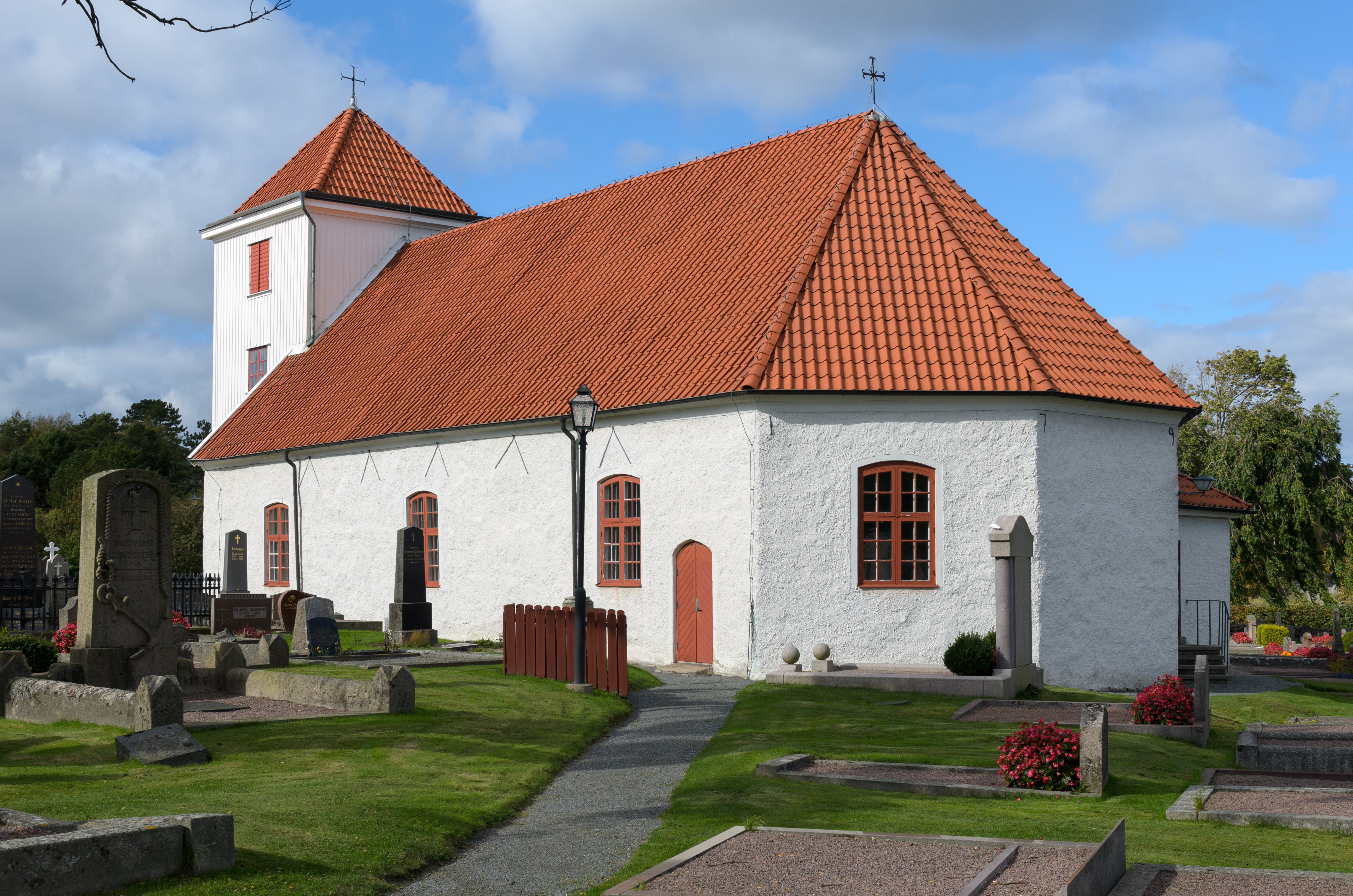 Styrsö kyrka (church). Styrsö Island, Gothenburg archipelago, Västra Götaland County. Church of Sweden, Diocese of Gothenburg, Styrsö parish.